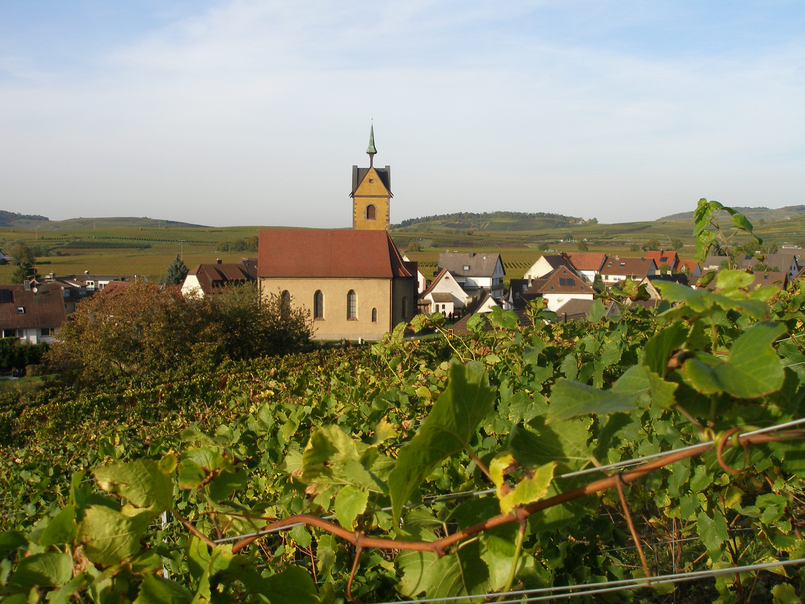 Niederrotweil